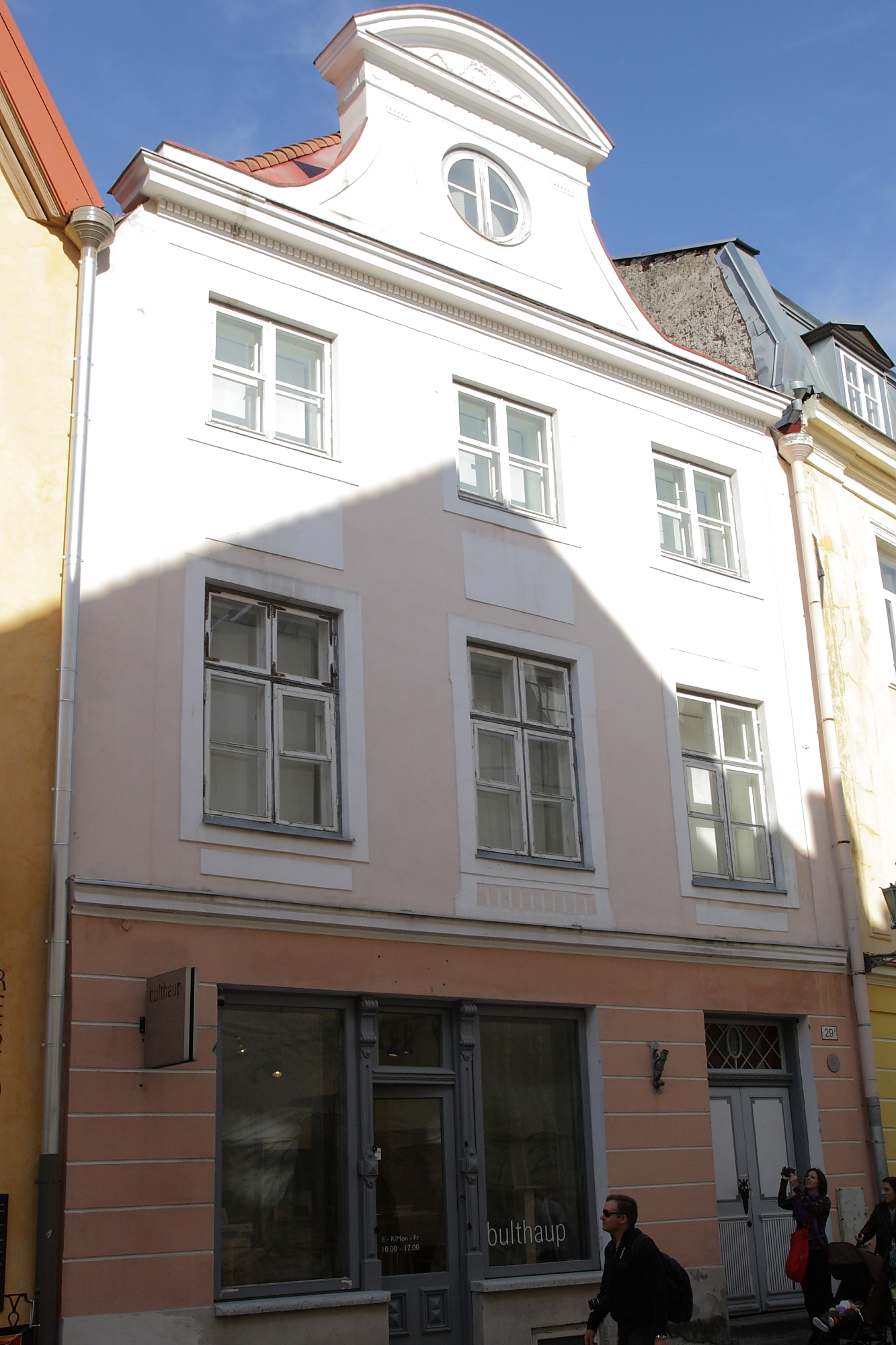 Tallinn, elamu Pikk 29a, 15.-20.saj